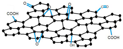 Oxido de Grafeno Reducido